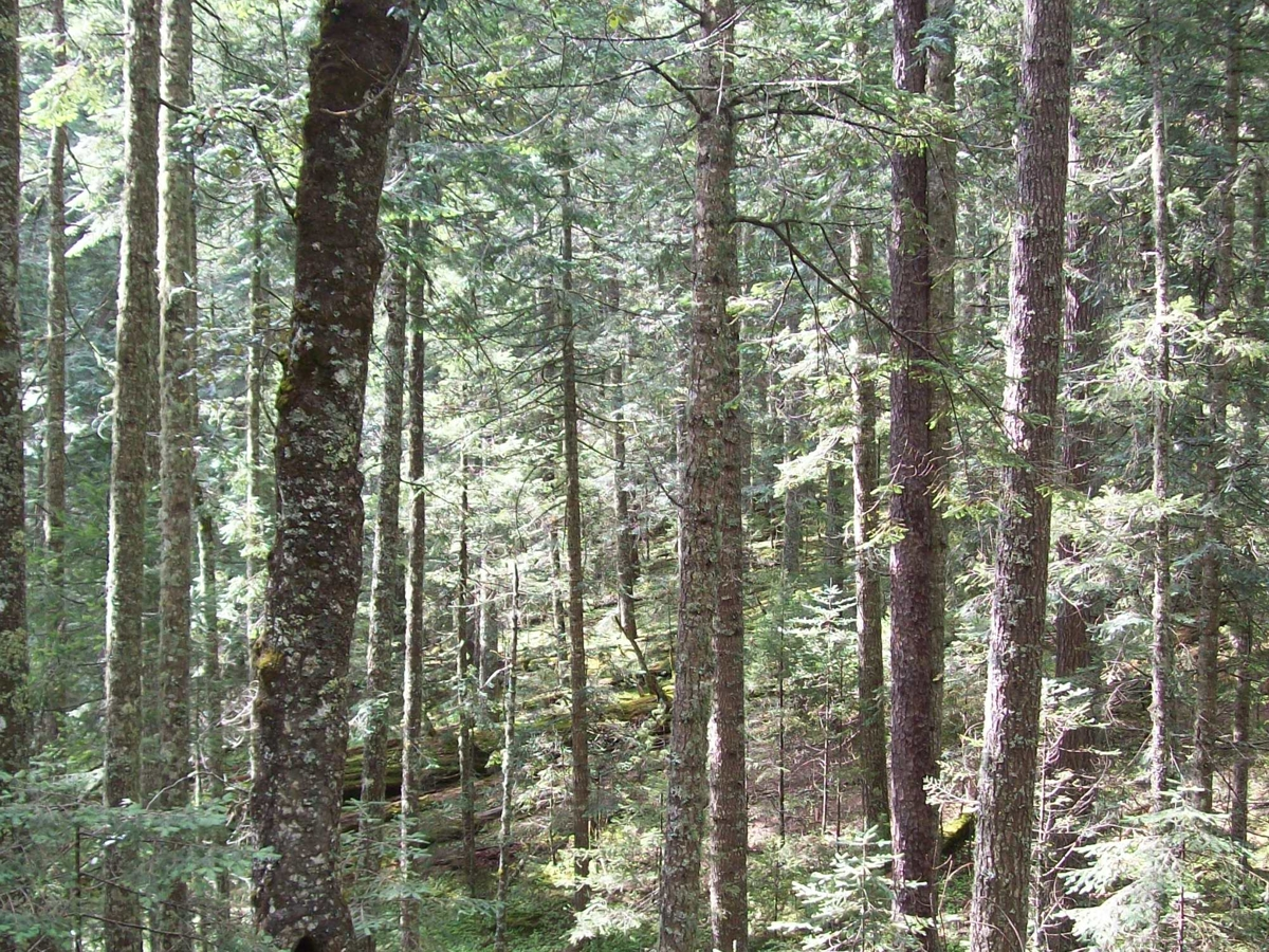 Abies durangensis in Tamazula, Durango, Mexico